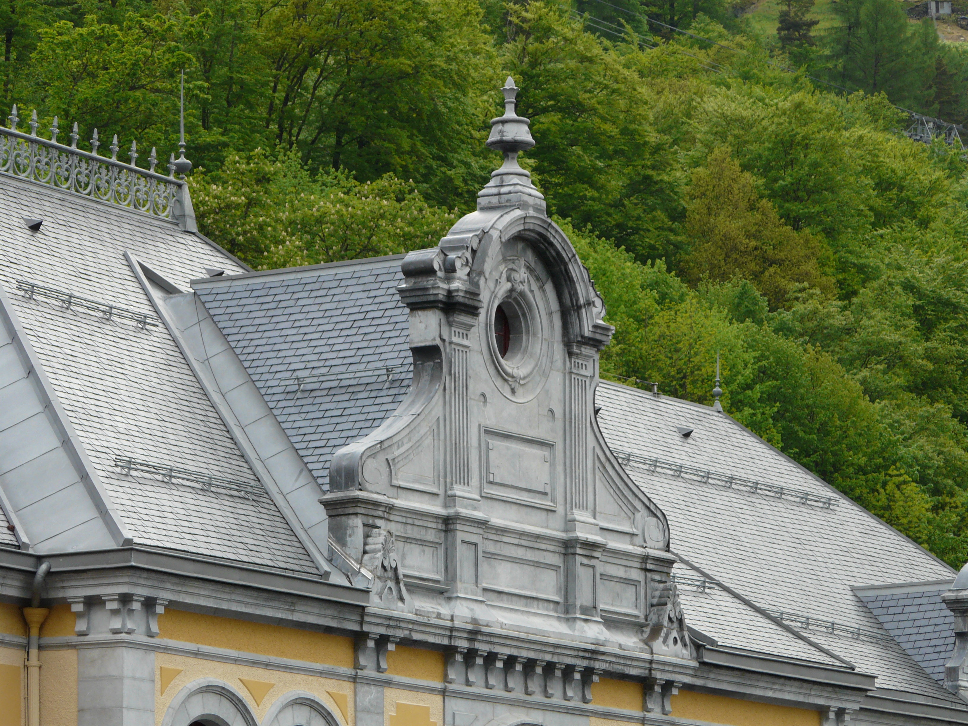 Lucarne du casino de Cauterets, Hautes-Pyrénées, France.